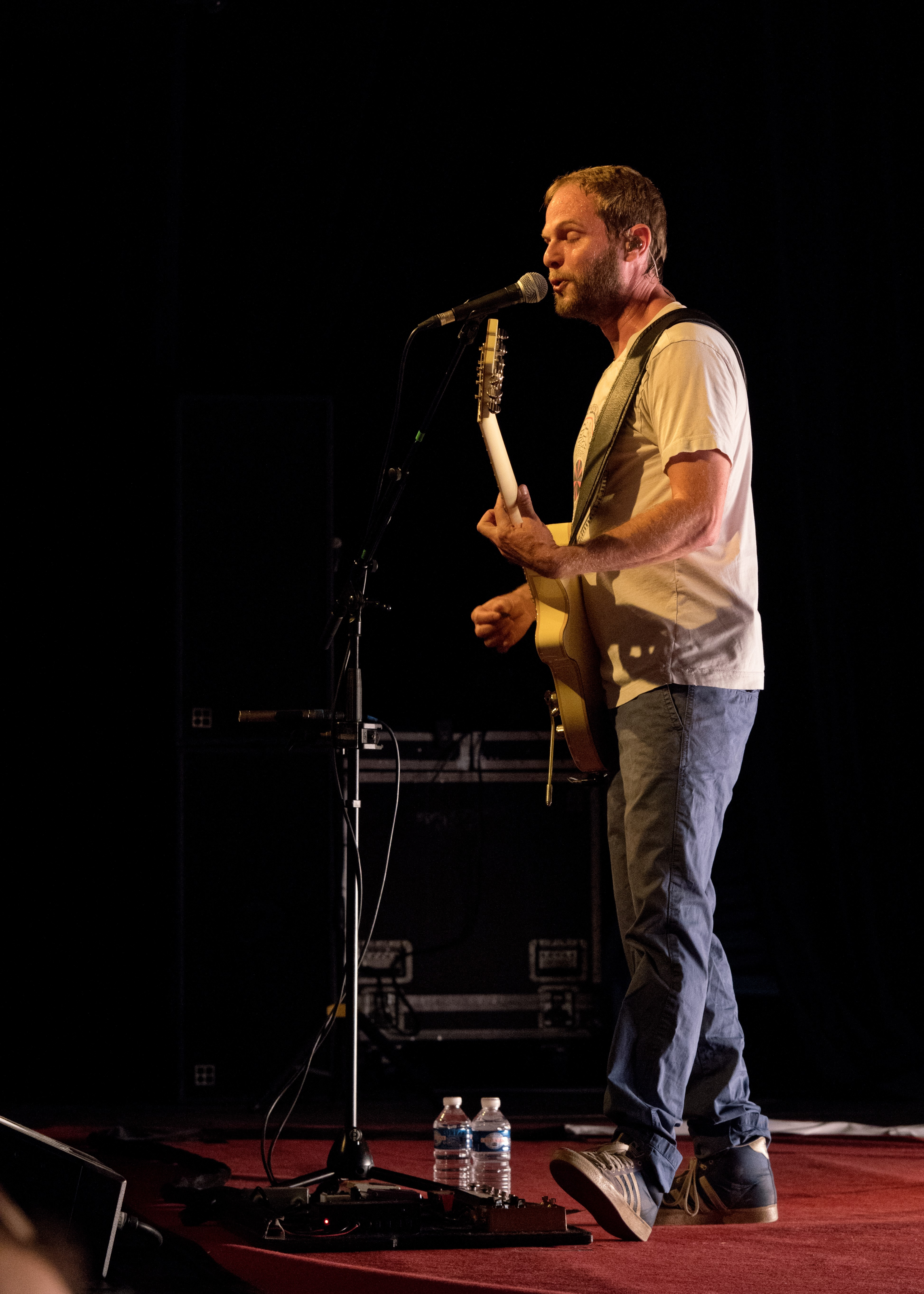 Bilder vom Zelt Musik Festival 2017 in Freiburg im Breisgau Sportfreunde Stiller am 18.07.2017